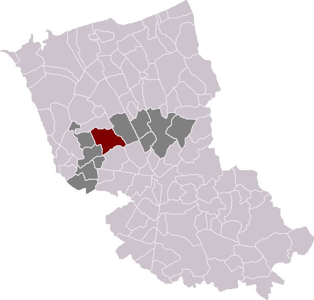 Locatie gemeente Bollezele in arrondissement Duinkerke. Zelfgemaakt. Location of Bollezeele municipality in the arrondissement of Dunkirk. Self made. Localisation de la commune de Bollezeele dans l'arrondissement de Dunkerque. Fait moi-même.